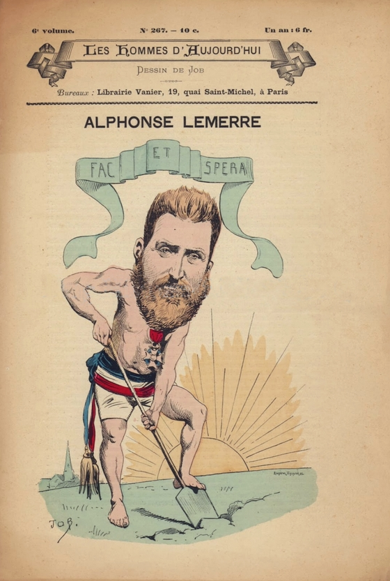 Les Hommes d'aujourd'hui, n°267 (1886). Caricature d’Alphonse Lemerre par Job (Jacques Onfroy de Bréville).